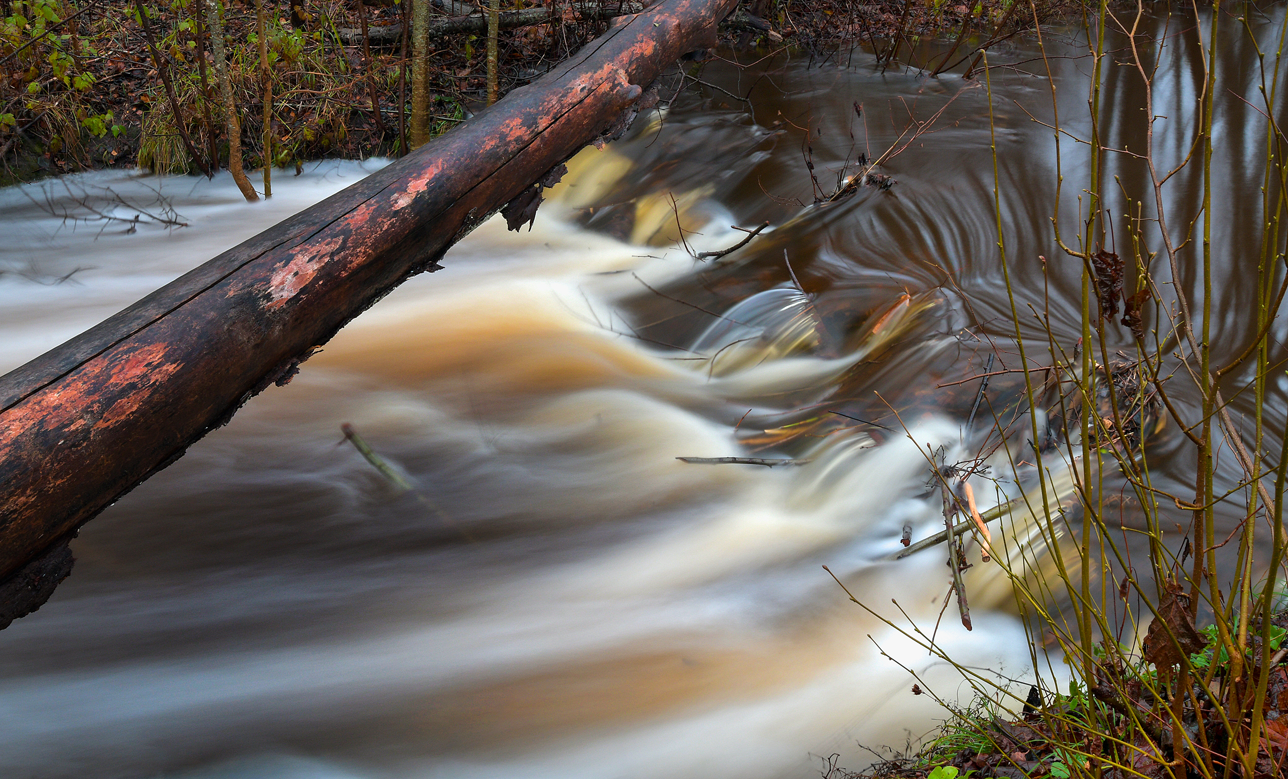 Seliste Männiku oja